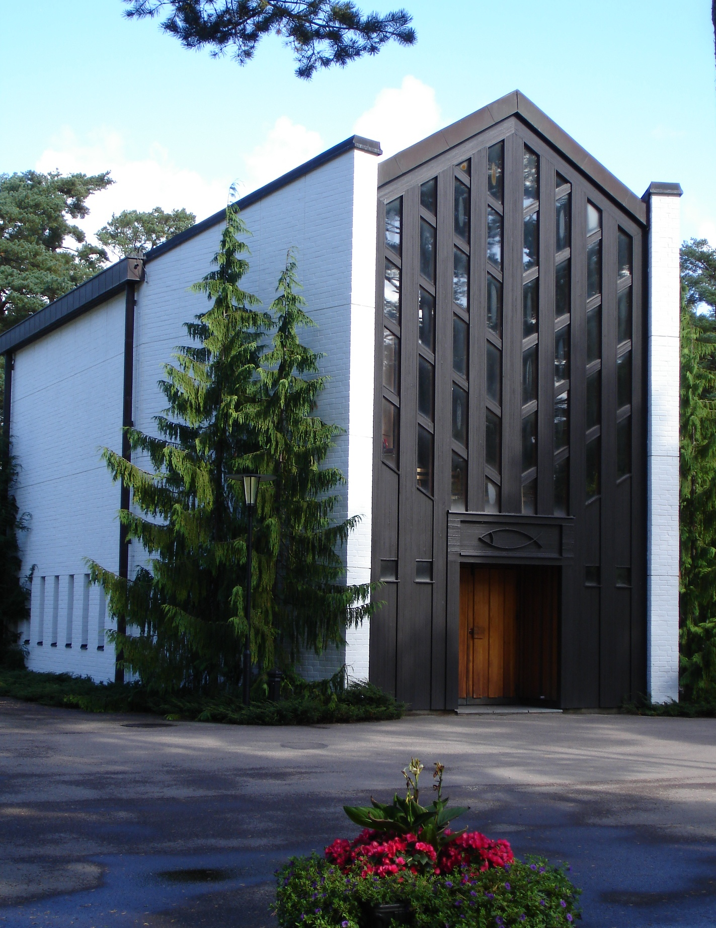 Annelundskyrkan i Ljungby i Småland